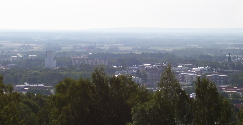 View over Skövde in Sweden seen from the mountain Billingen. (Vy över Skövde från Billingen)